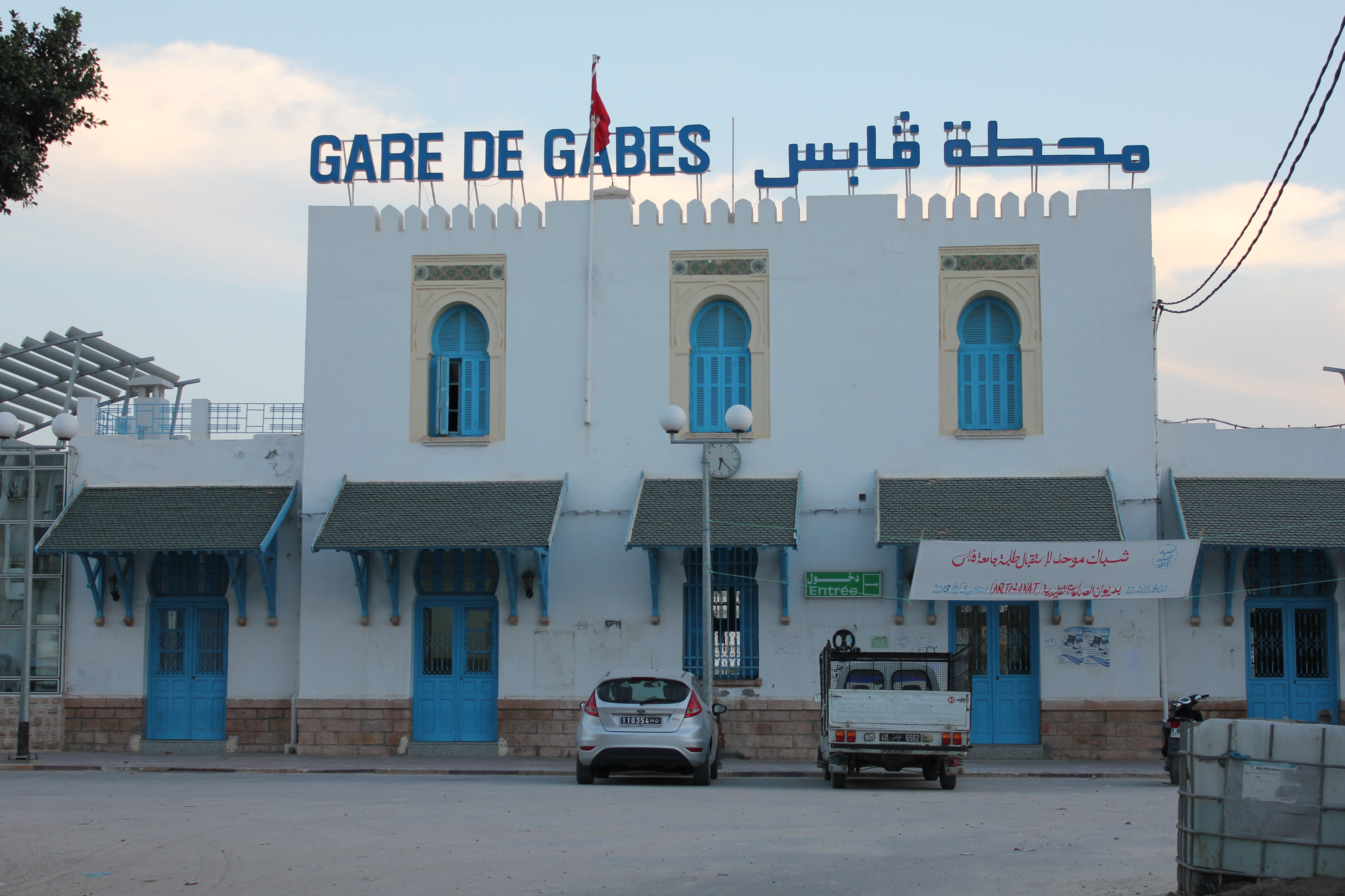 Façades de la gare de chemin de fer de Gabès, Gabès